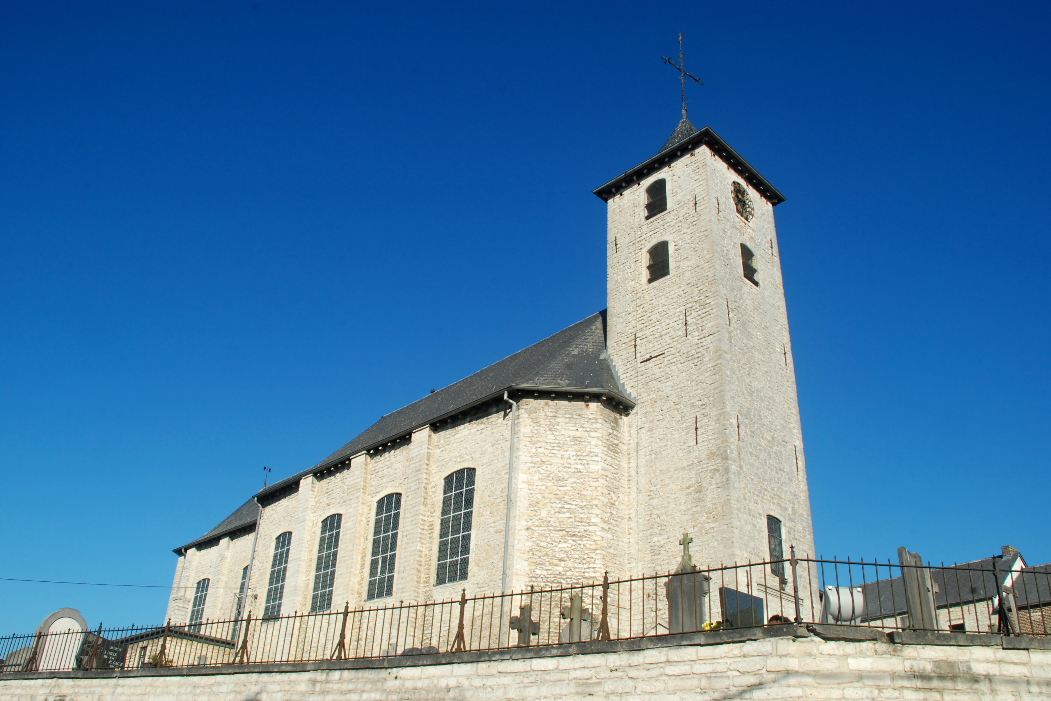 Belgique - Brabant wallon - Jodoigne - Saint-Remy-Geest - Église Saint-Remy